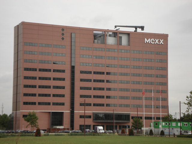 Riekerpolder, Mexx building